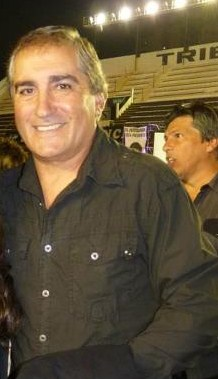 Foto de pepe romero tomada en la fiesta aniversario